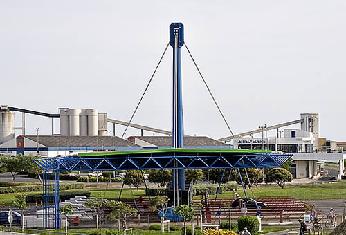 Péage du Pont de l'île de Ré - Charente-Maritime Photo issue de ma banque d'images. Alain Pep.per